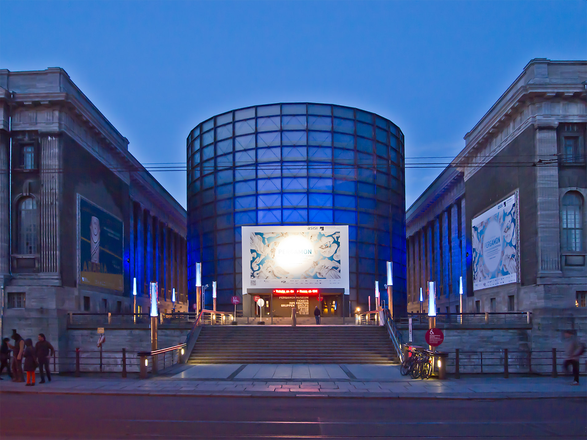 Pergamon-Museum, der große Zylinder in der Mitte enthielt das 360-Grad-Rundbild des Künstlers Asisi. Die Ausstellung lief von September 2011 bis Oktober 2012.